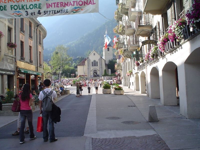 Vue du centre ville de la commune deChamonix-Mont-Blanc en France dans le département de la Haute-Savoie.